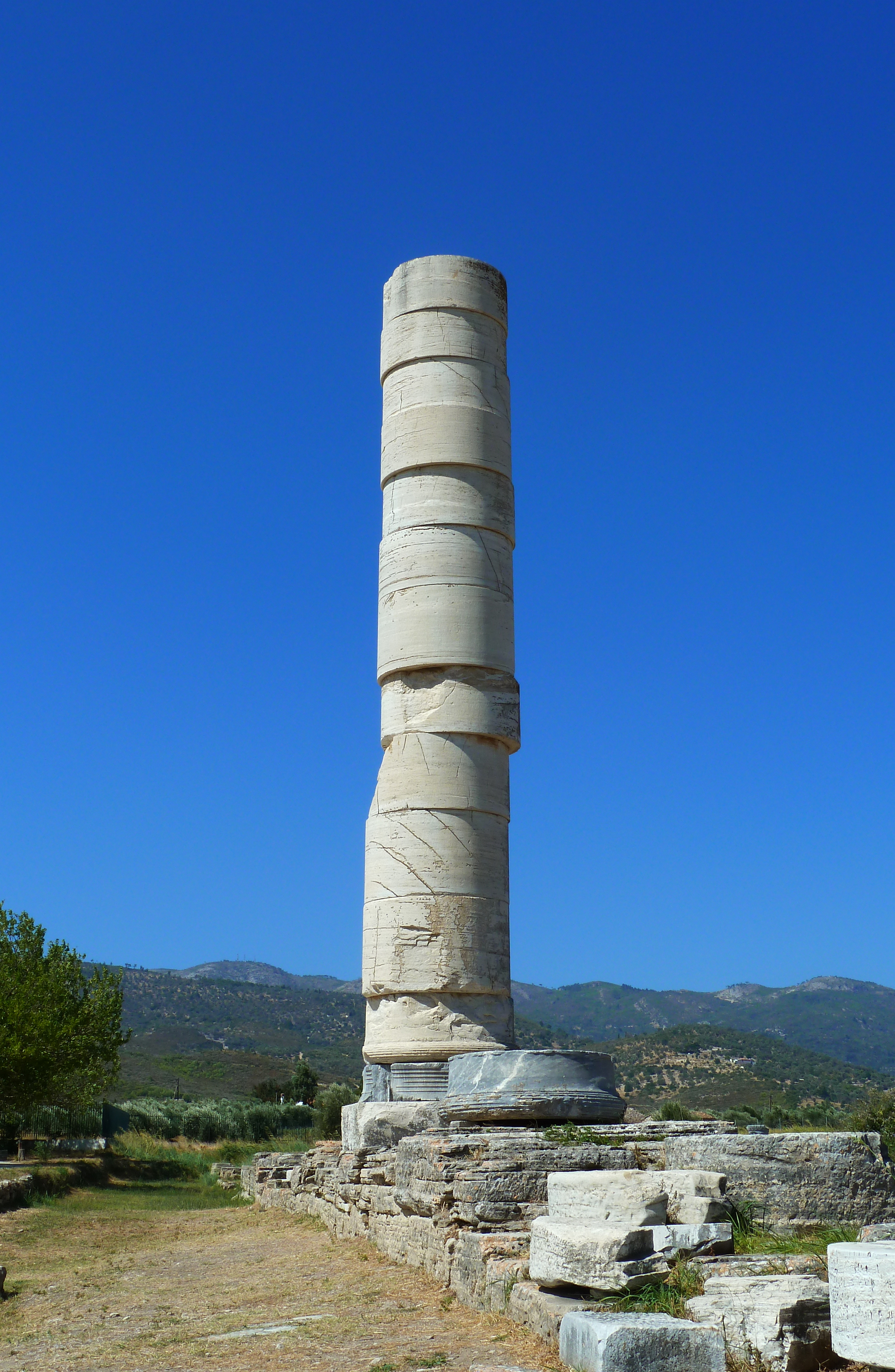 Heraion von Samos, einzige noch stehende, rund zehn Meter hohe Säule vom Tempel der griechischen Göttin Hera.